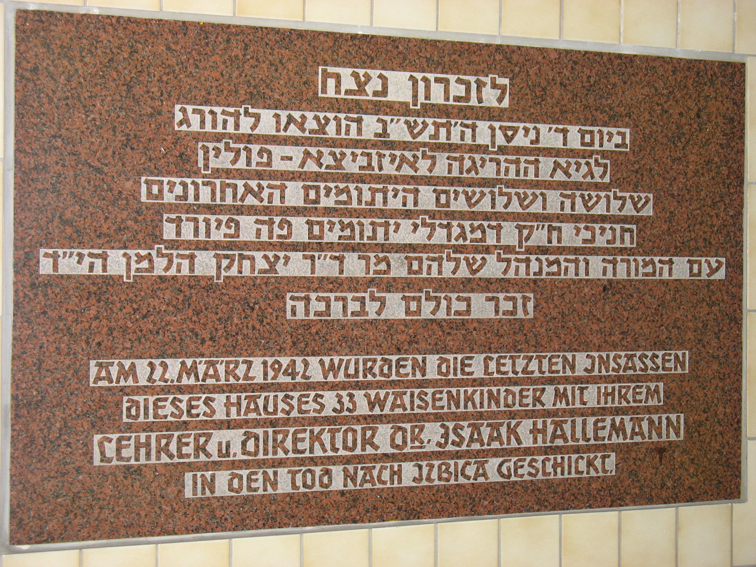 Gedenktafel zum Abtransport vom Leiter Isaac Halleman und den Kindern des Jüdischen Waisenhause in Fürth am 22.03.1942